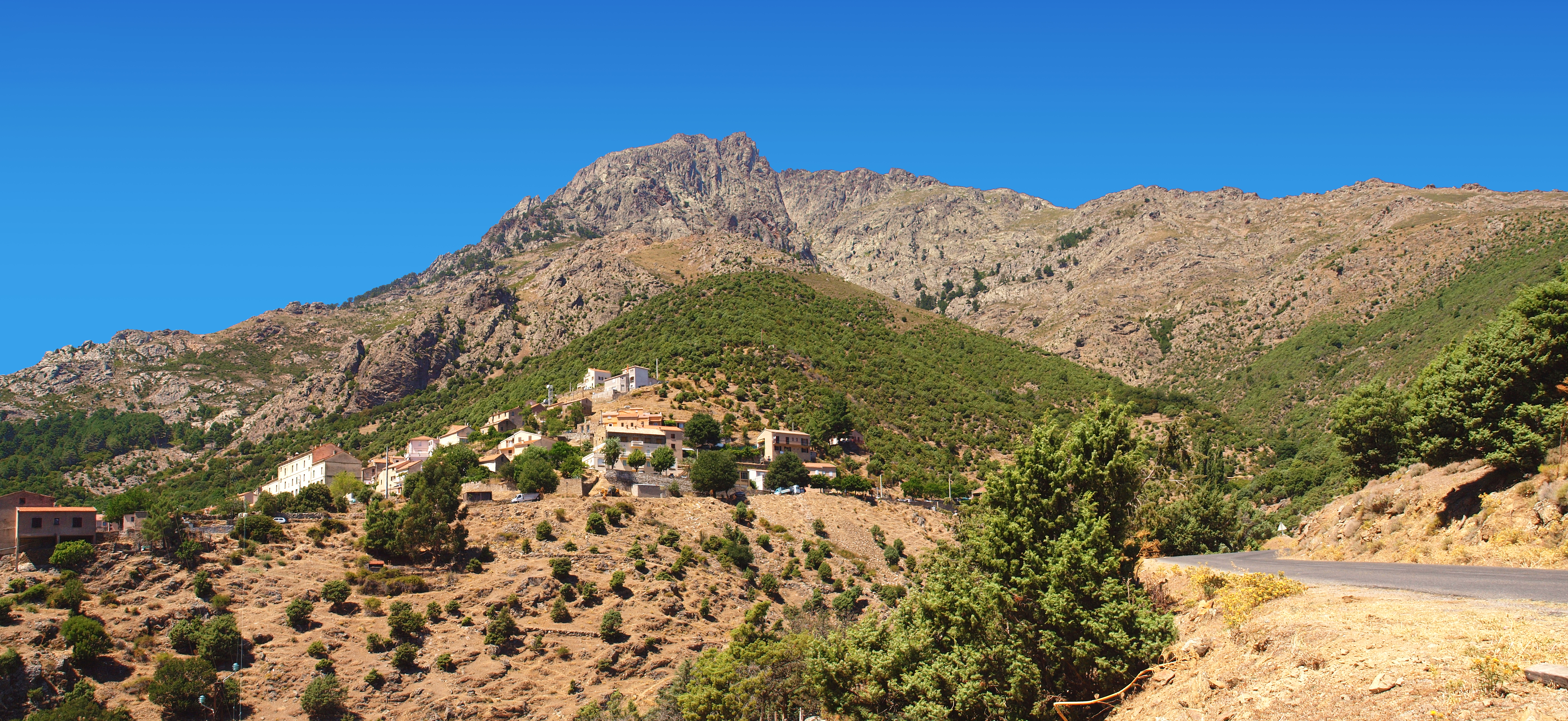 Asco (Corsica) - Vue du village